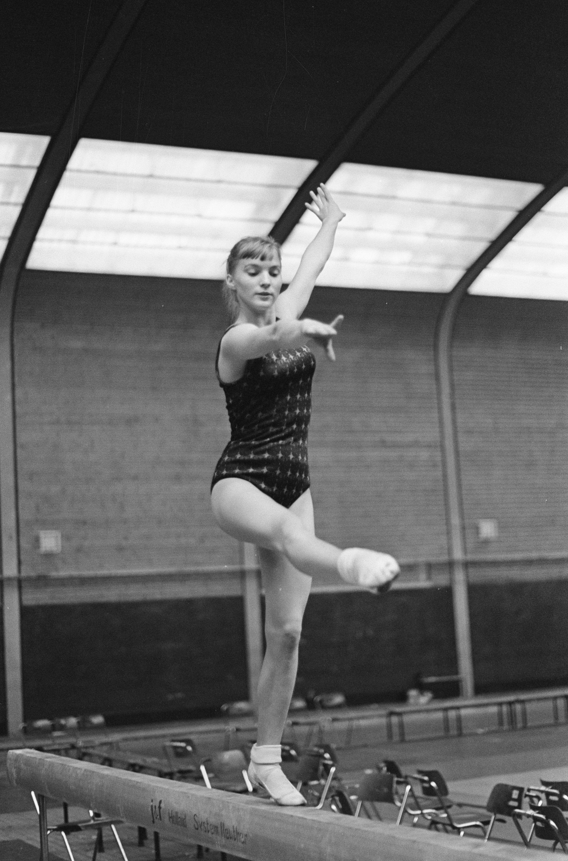 Collectie / Archief : Fotocollectie Anefo Reportage / Serie : Wereldkampioenschappen turnen 1966 in Dortmunt Beschrijving : Russische turnster Larisa Petrick in aktie op de evenwichtsbalk Datum : 21 september 1966 Locatie : Dortmund, Duitsland Trefwoorden : sport, sportmanifestaties, turnen Persoonsnaam : Petrick, Larisa Fotograaf : Ron Kroon / Anefo Auteursrechthebbende : Nationaal Archief Materiaalsoort : Negatief (zwart/wit) Nummer archiefinventaris : bekijk toegang 2.24.01.05 Bestanddeelnummer : 919-5842